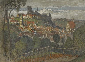 Entwurf für das Wandbild im neuen Landtagsgebäude zu Dresden